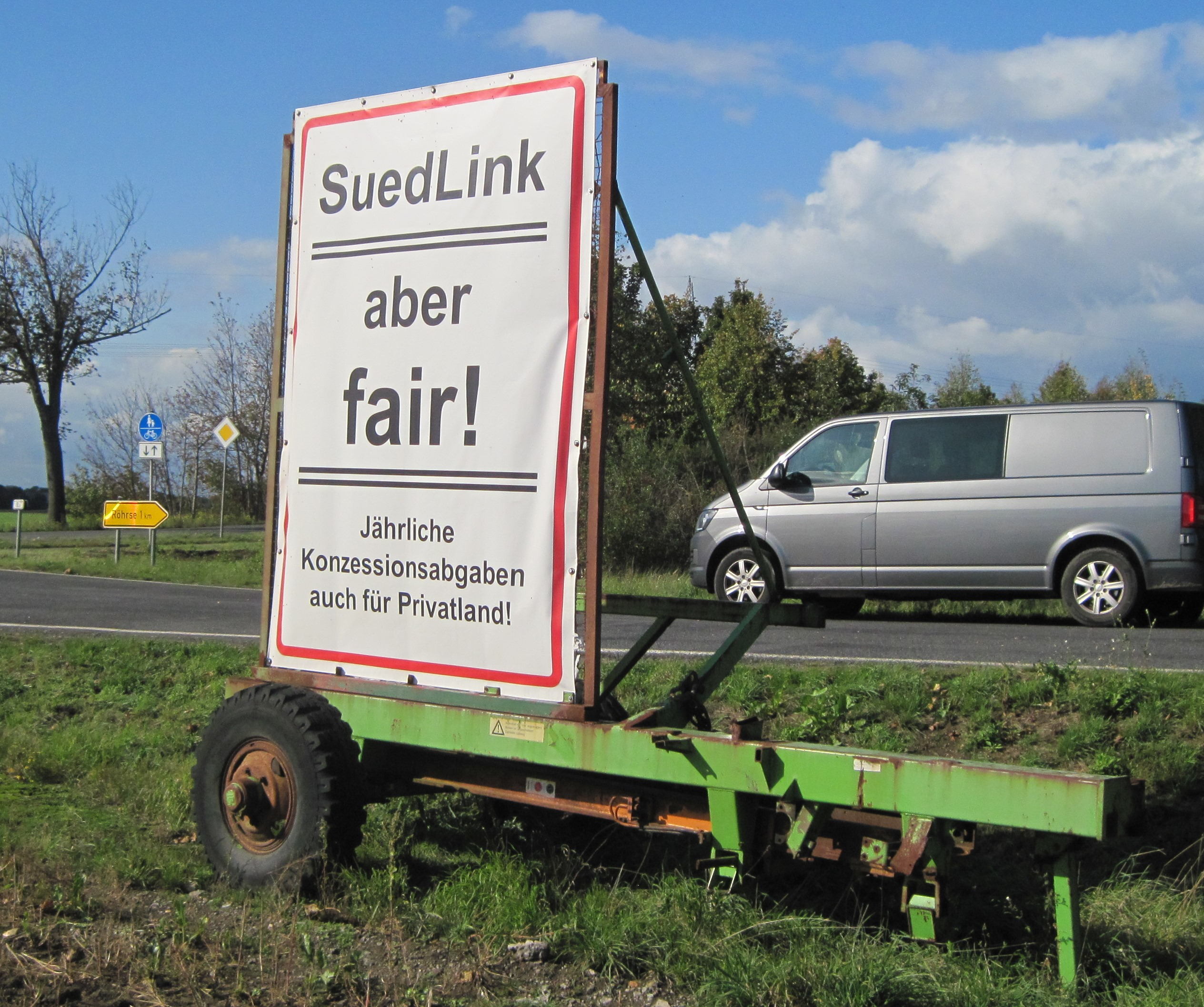 Aufsteller zur geplanten Starkstromtrasse SuedLink nähe Peine-Röhrse. Die „Gegnerschaft“ ist nicht generell, man verlangt aber eine dauerhafte Nutzungsentschädigung.